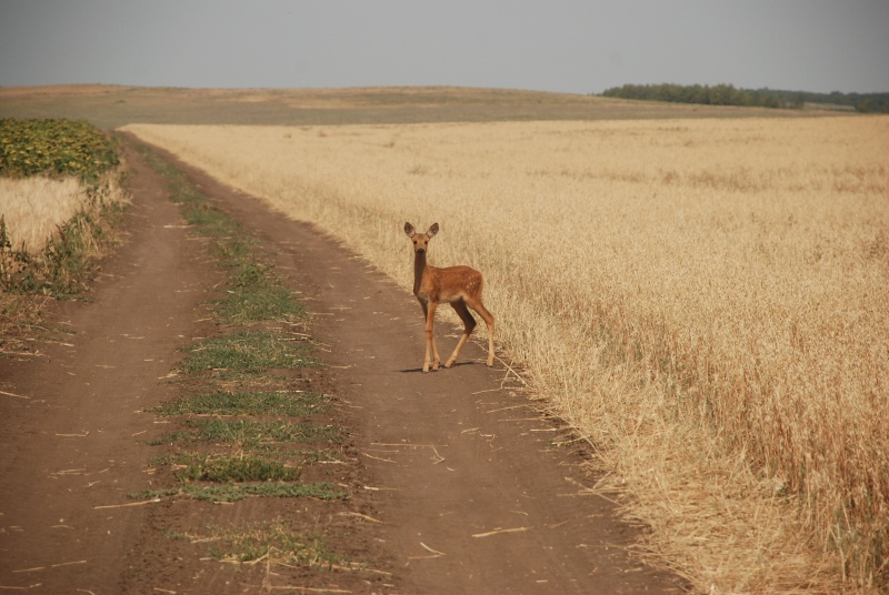 Косуля в Камышинском районе Волгоградской области.